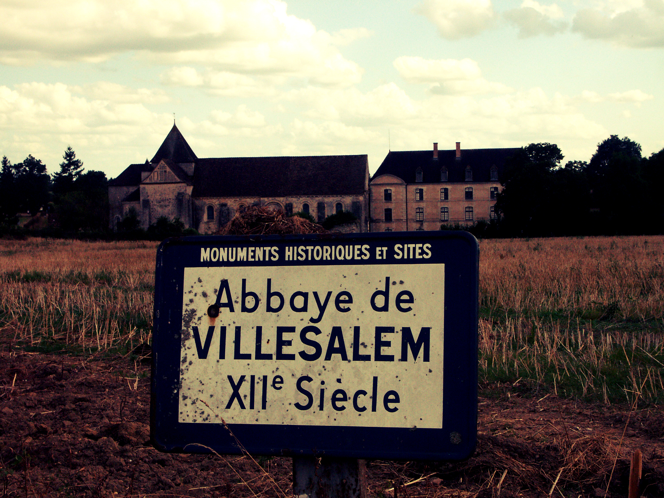 Abbaye de Villesalem, Vienne